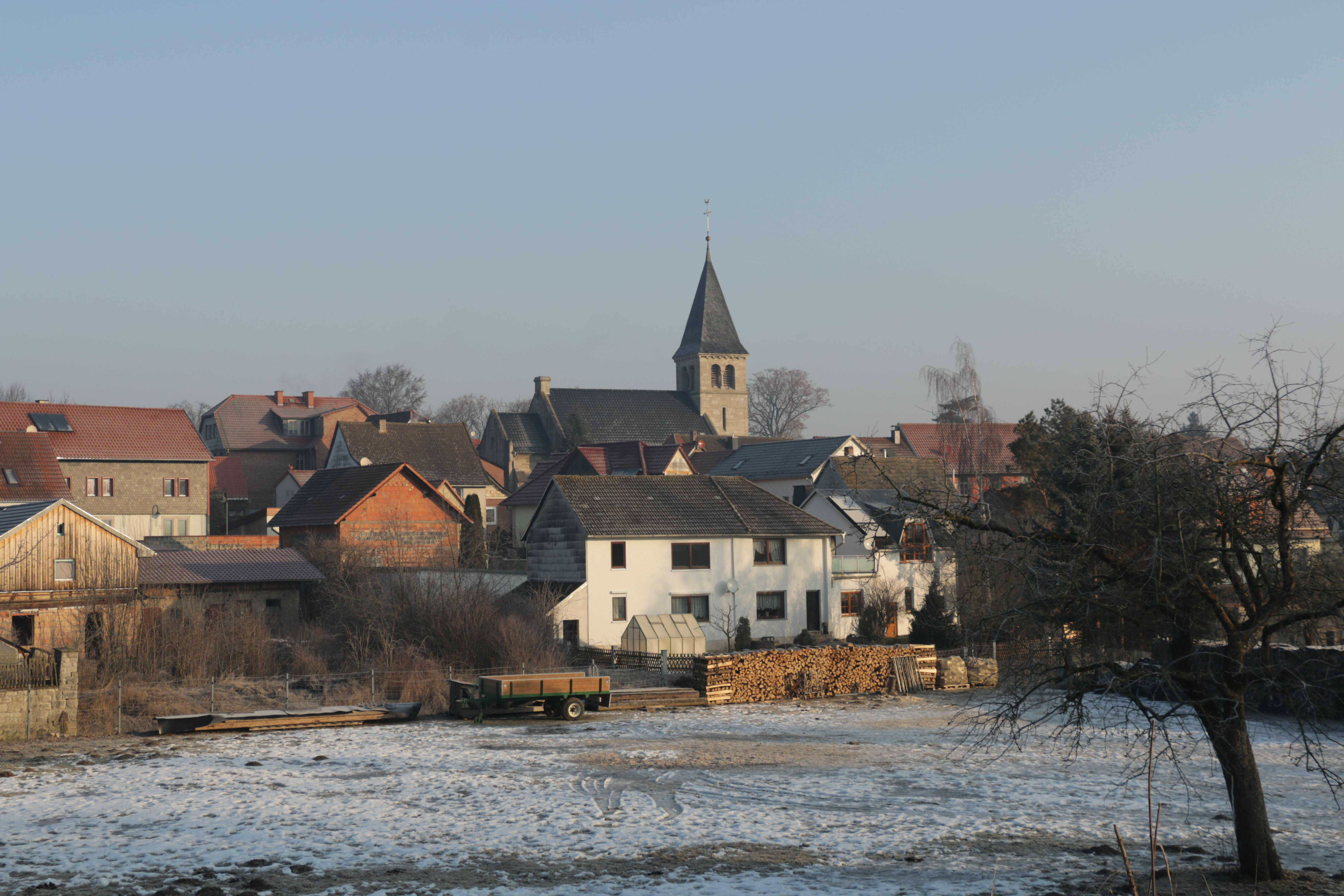 Lengefeld, Ortsmitte.